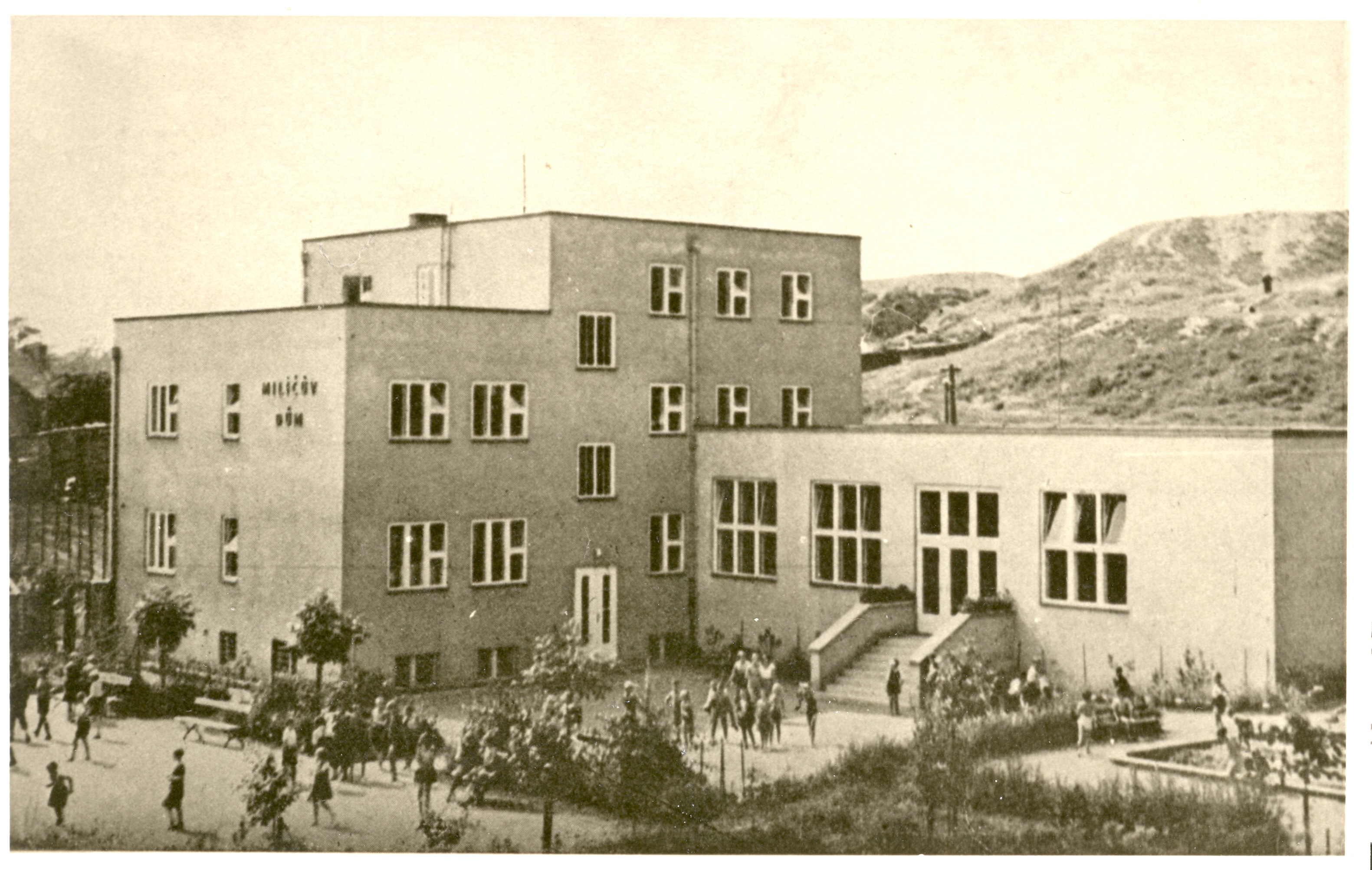 Milíčův dům v roce 1937, foto z Archivu P. Pittra a O. Fierzové